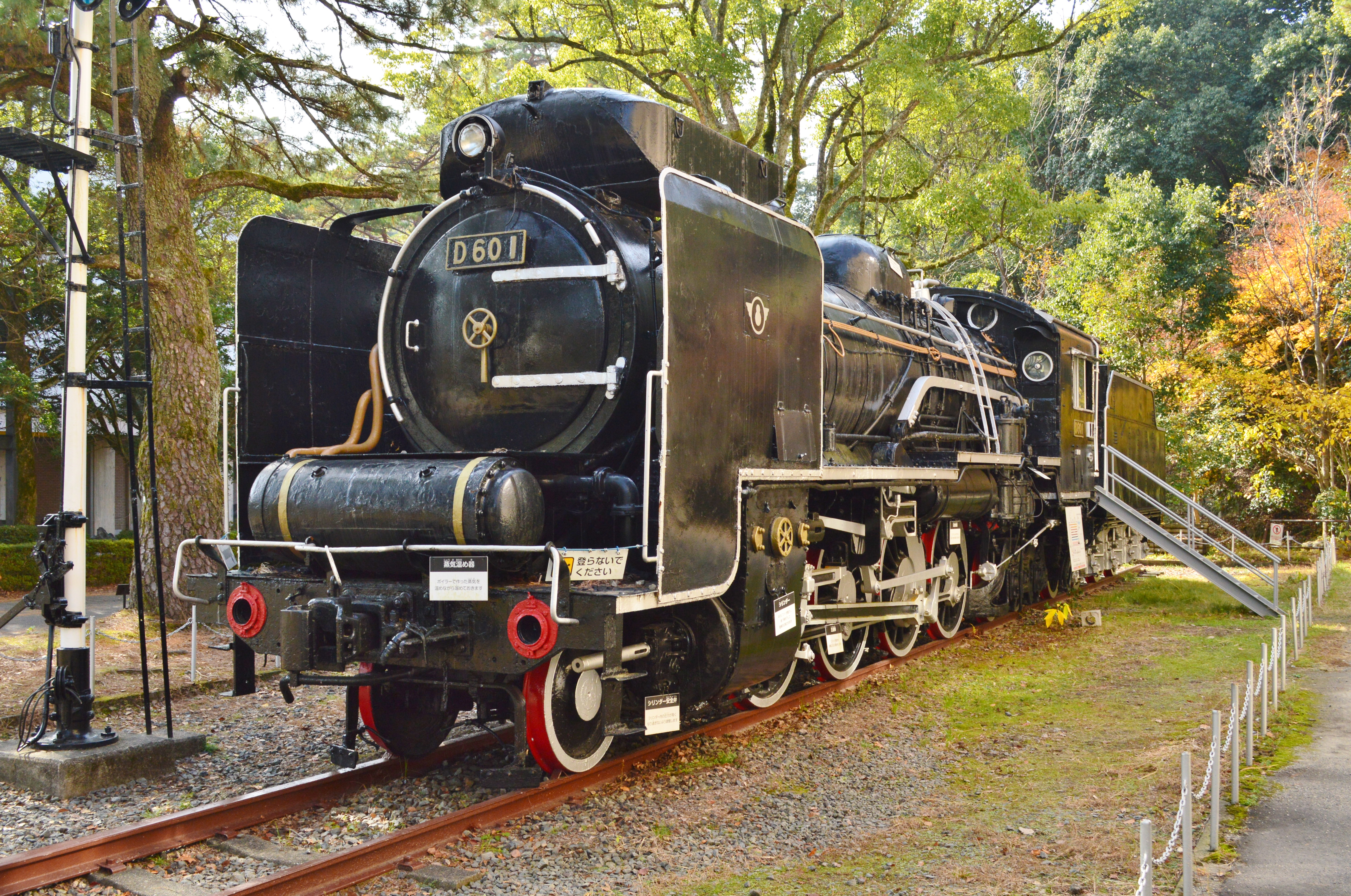 D60 1 (山口県立山口博物館にて) Nikon D3200